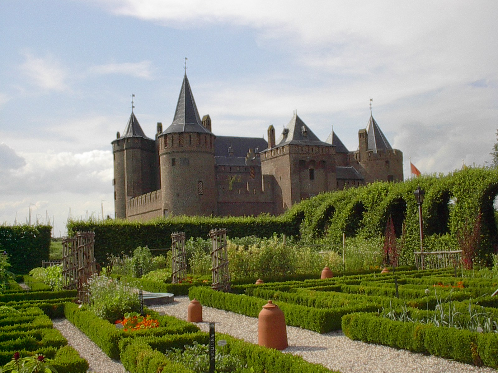 Muiderslot met moestuin, Muiden, The Netherlands